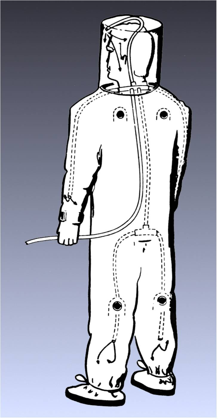 Пневмокостюм